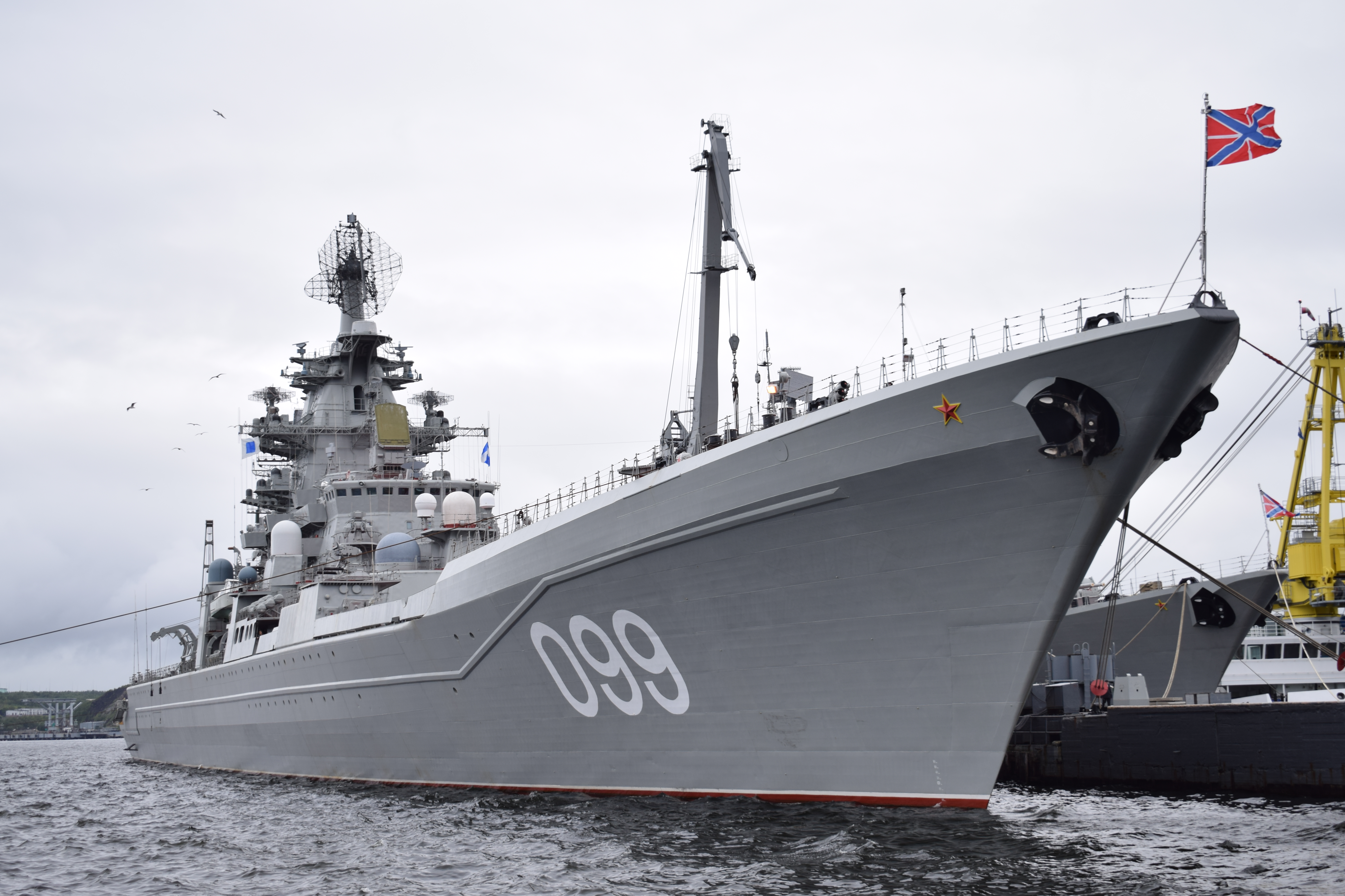 Ордена Нахимова тяжёлый атомный ракетный крейсер «Пётр Великий» - четвёртый по счёту и единственный находящийся в строю тяжёлый атомный ракетный крейсер (ТАРКР) третьего поколения проекта 1144 «Орлан»